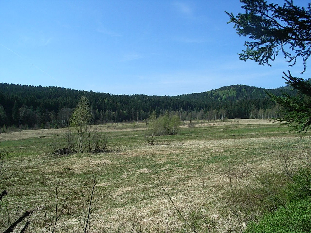 Die Stockauwiesen im April